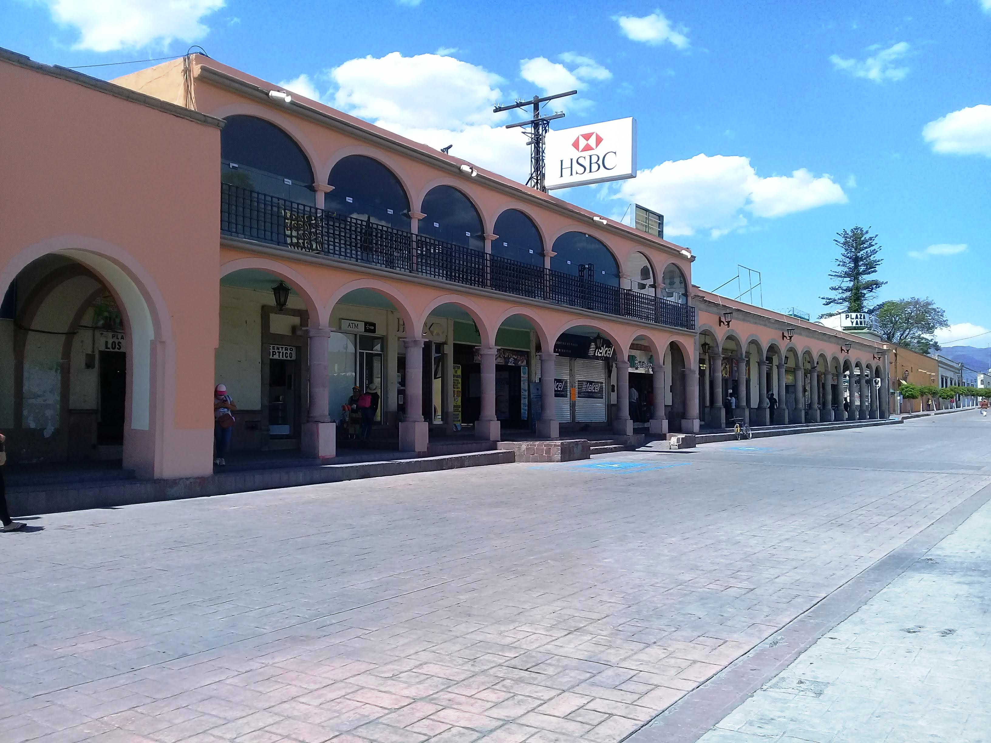 Plaza Juárez en Actopan, Hidalgo, México.